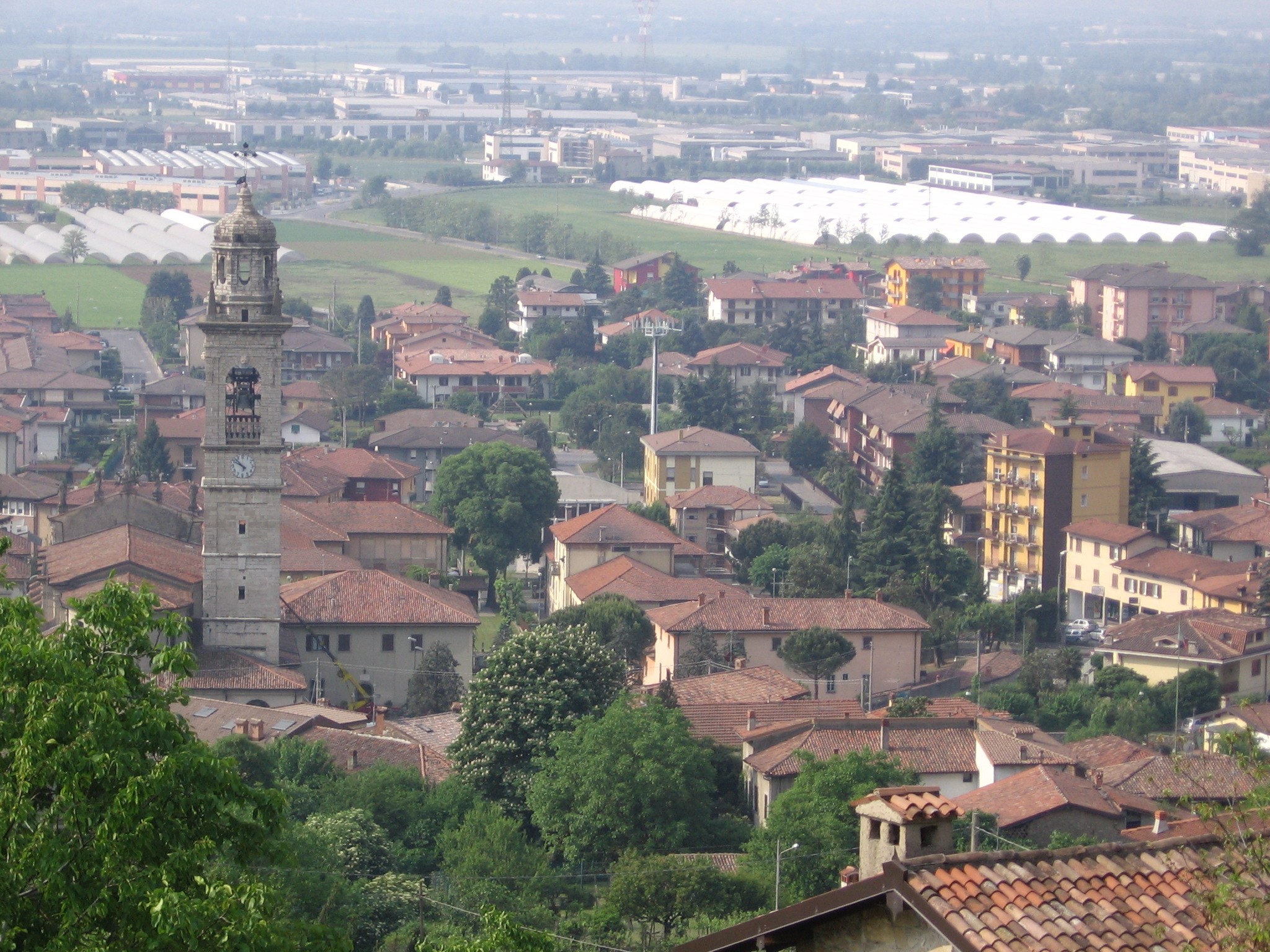 Chiuduno, Bergamo, Italia